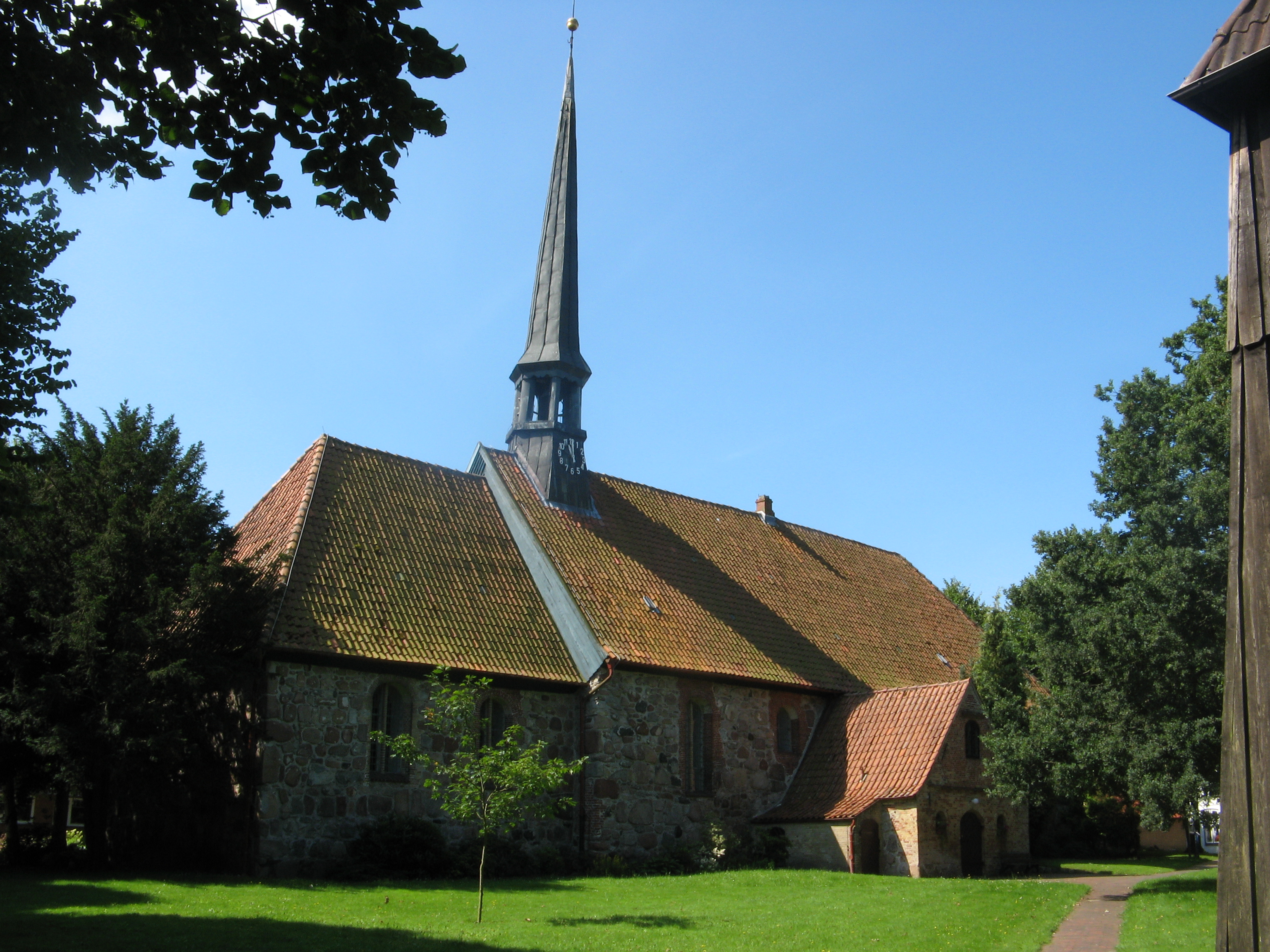 church in Tellingstedt